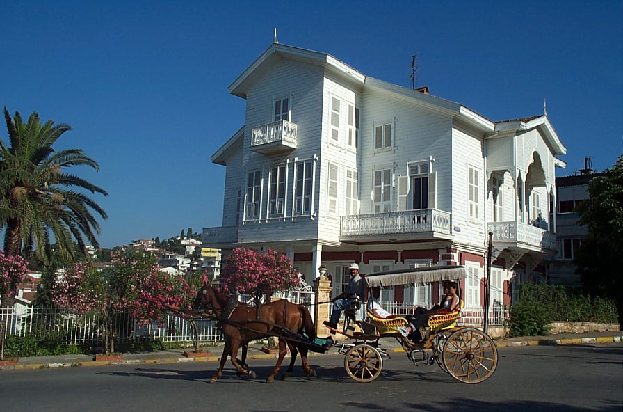 Büyükada House